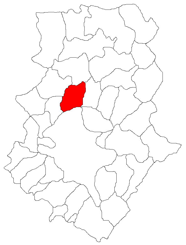 Categorie:Hărţi ale judeţului Ilfov